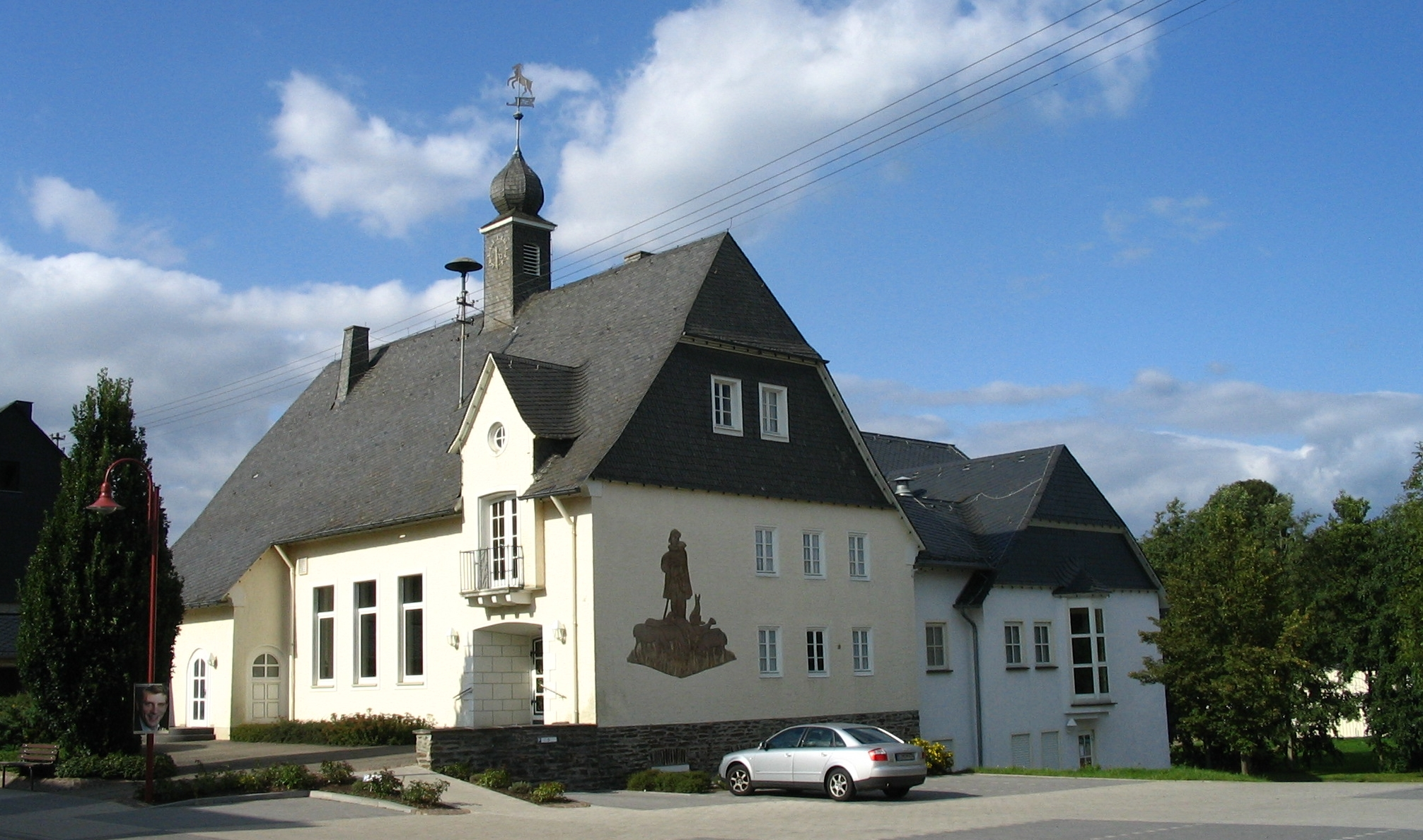 Gemeindehaus Alterkülz im Hunsrück